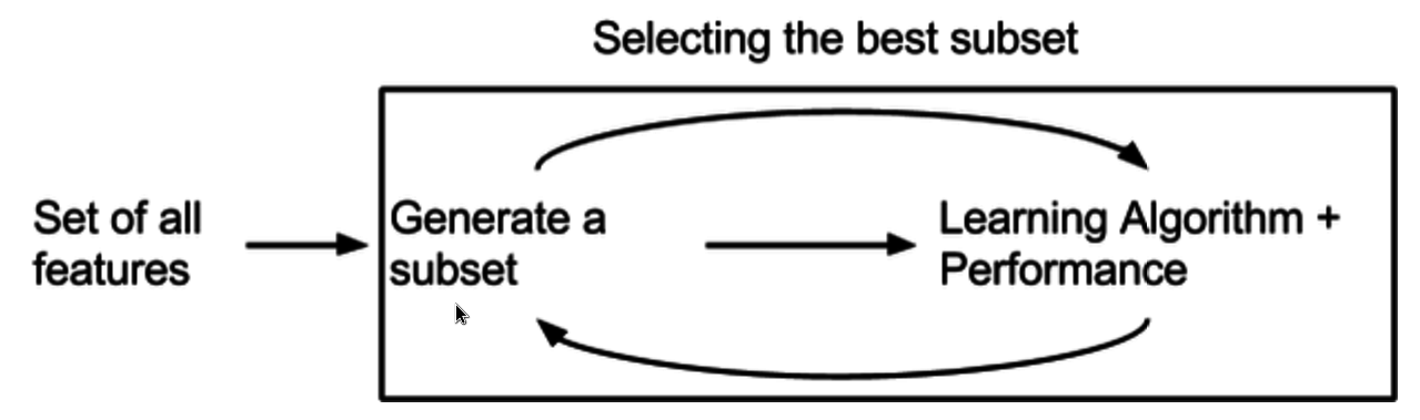 Embedded method pour la selection d'attribut